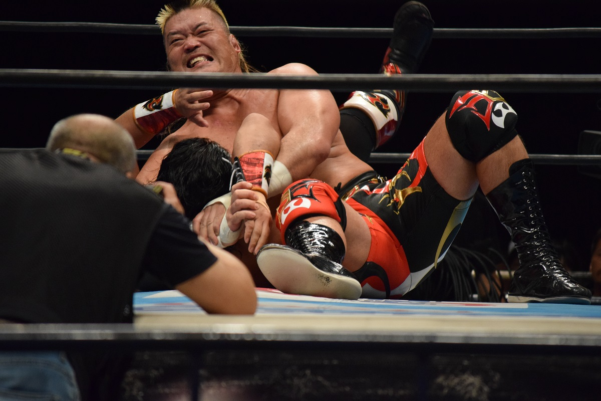 2016年8月6日 大阪府立体育会館 「G1 CLIMAX 26」 後藤洋央紀にアナコンダバイスを極める天山広吉